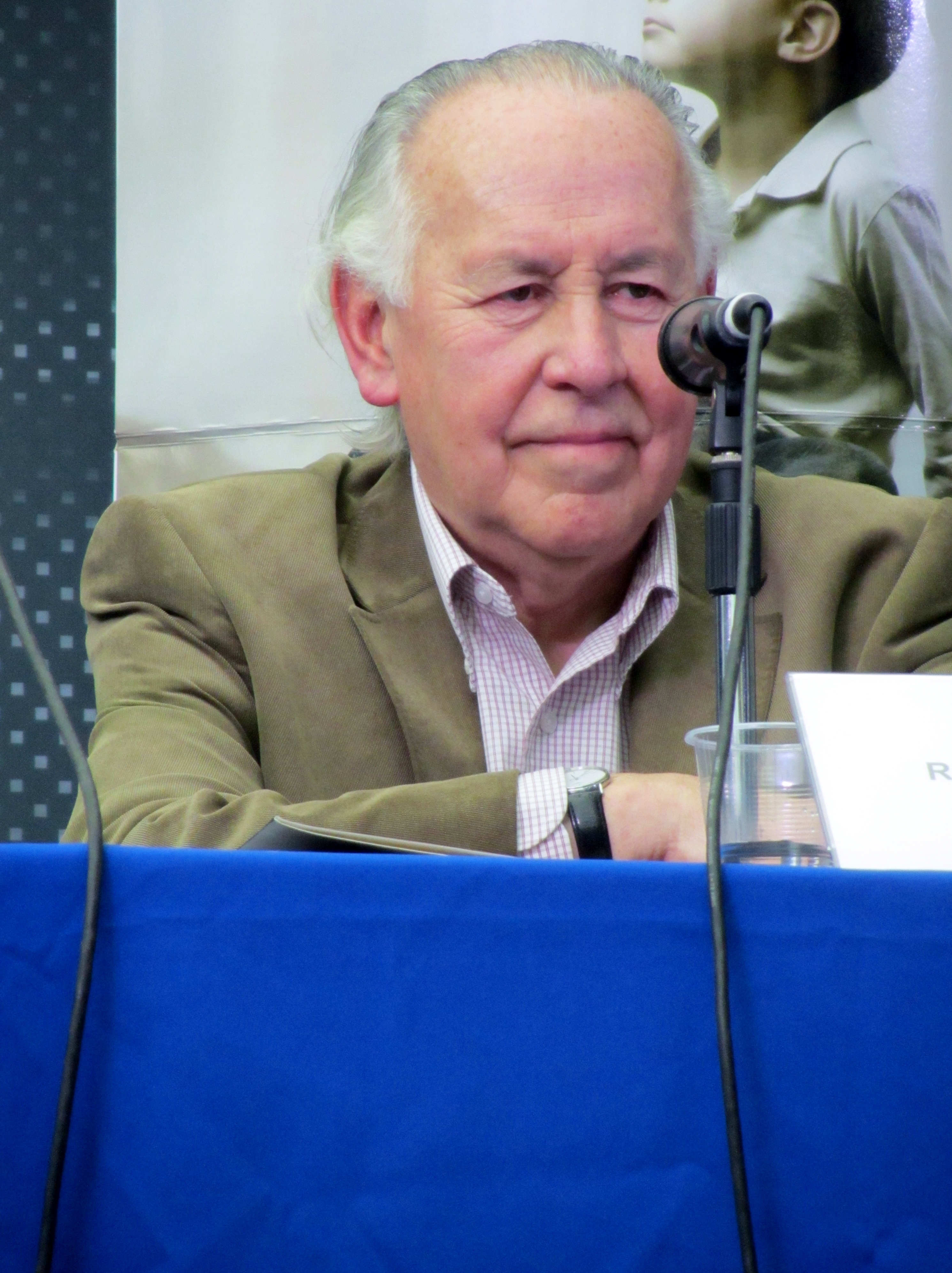 El agrónomo y político chileno Rafael Moreno Rojas en la Feria Internacional del Libro de Santiago 2015